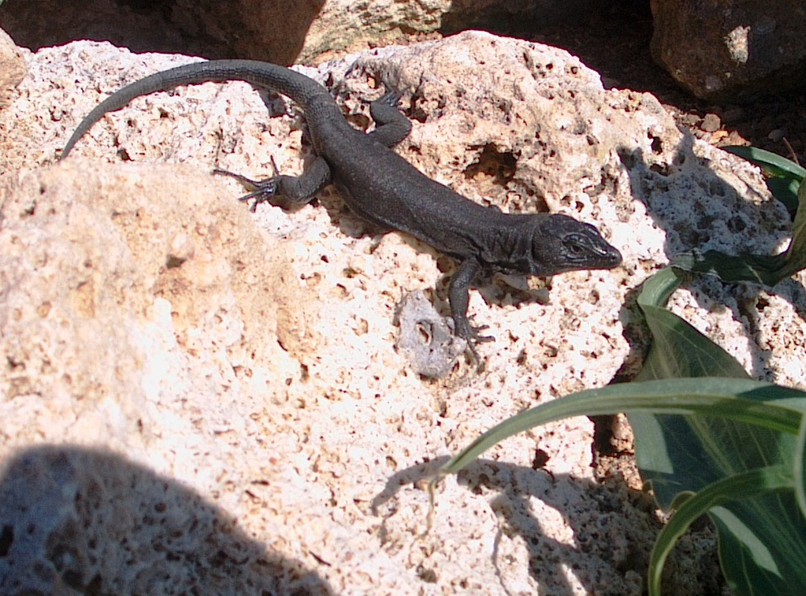 Sargantana de l'Illa de l'Aire, Menorca